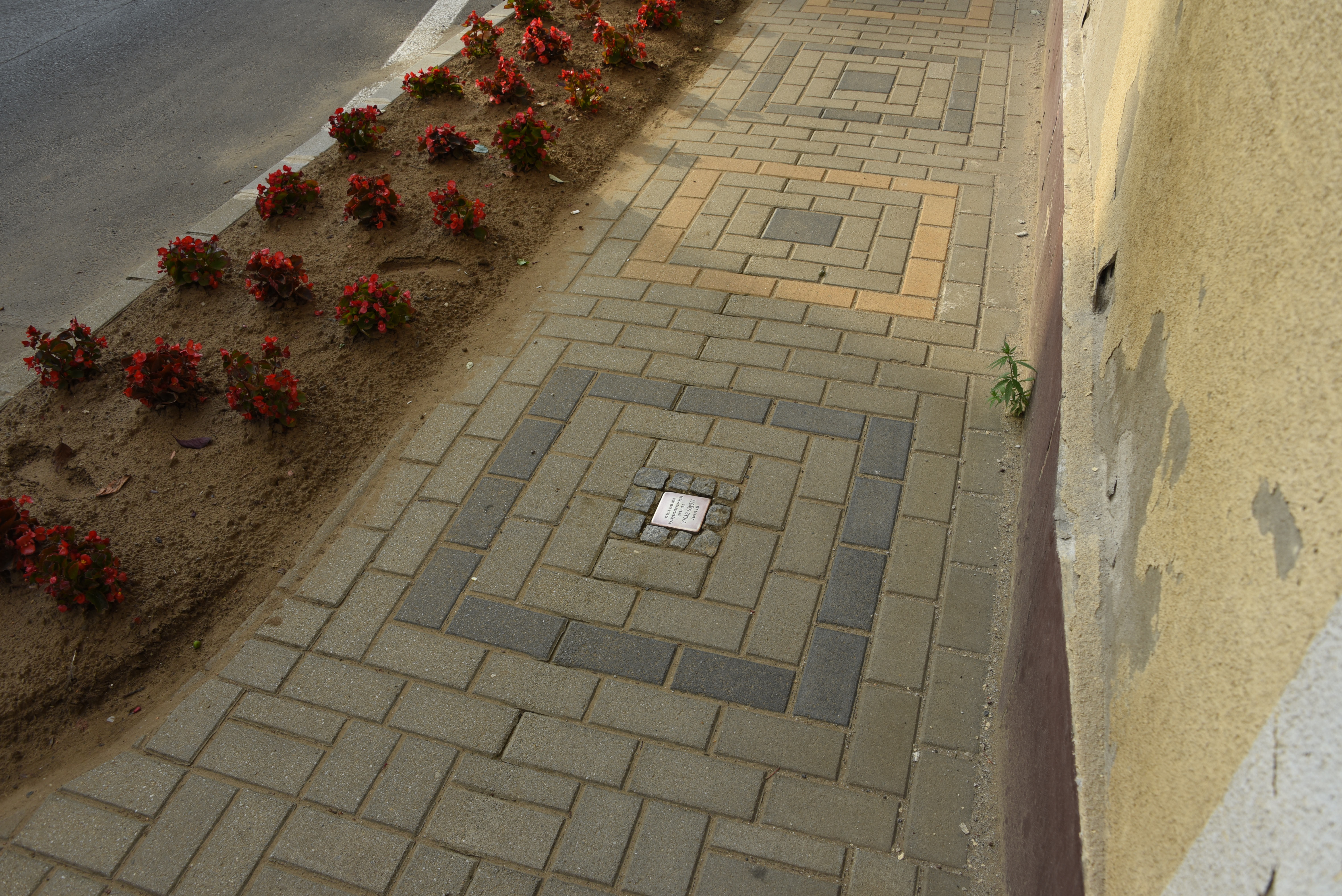 Stolperstein in Újfehértó Város